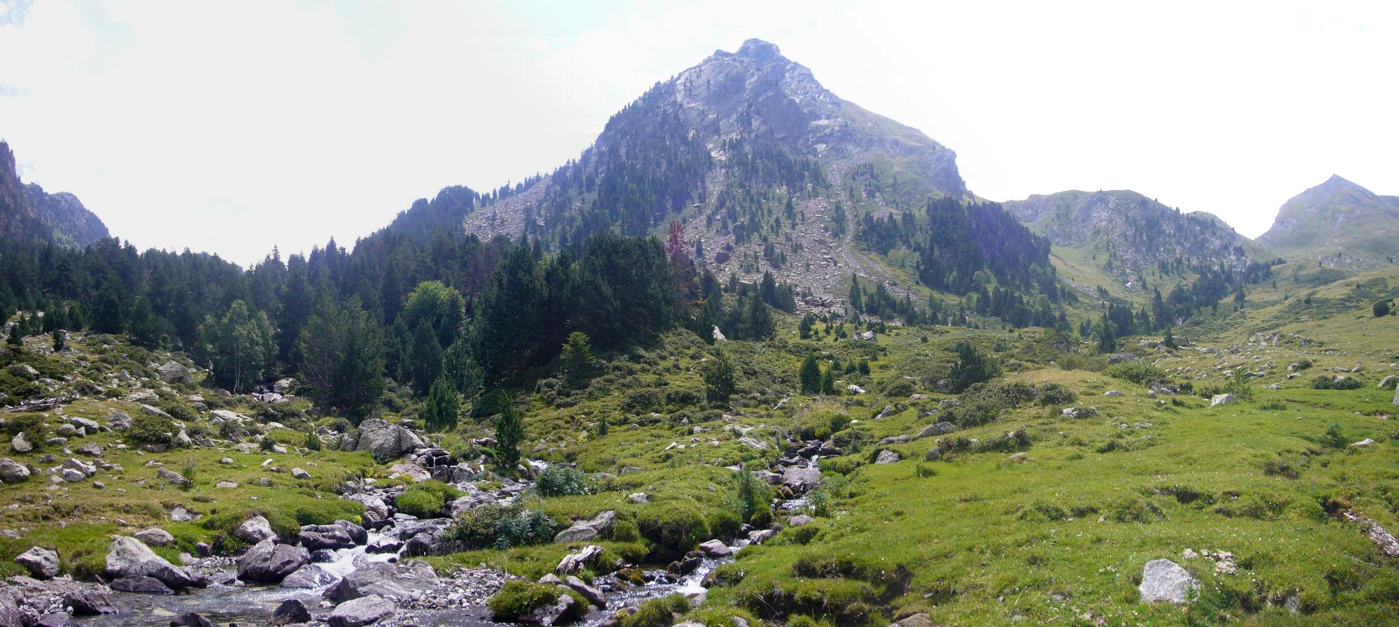 Bony del Graller vist des de la confluència dels barrancs de les Mussoles i del Montayó; la Vall de Boí, Alta Ribagorça, Catalunya